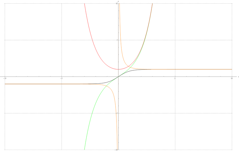 Հիպերֆունկցիաներ